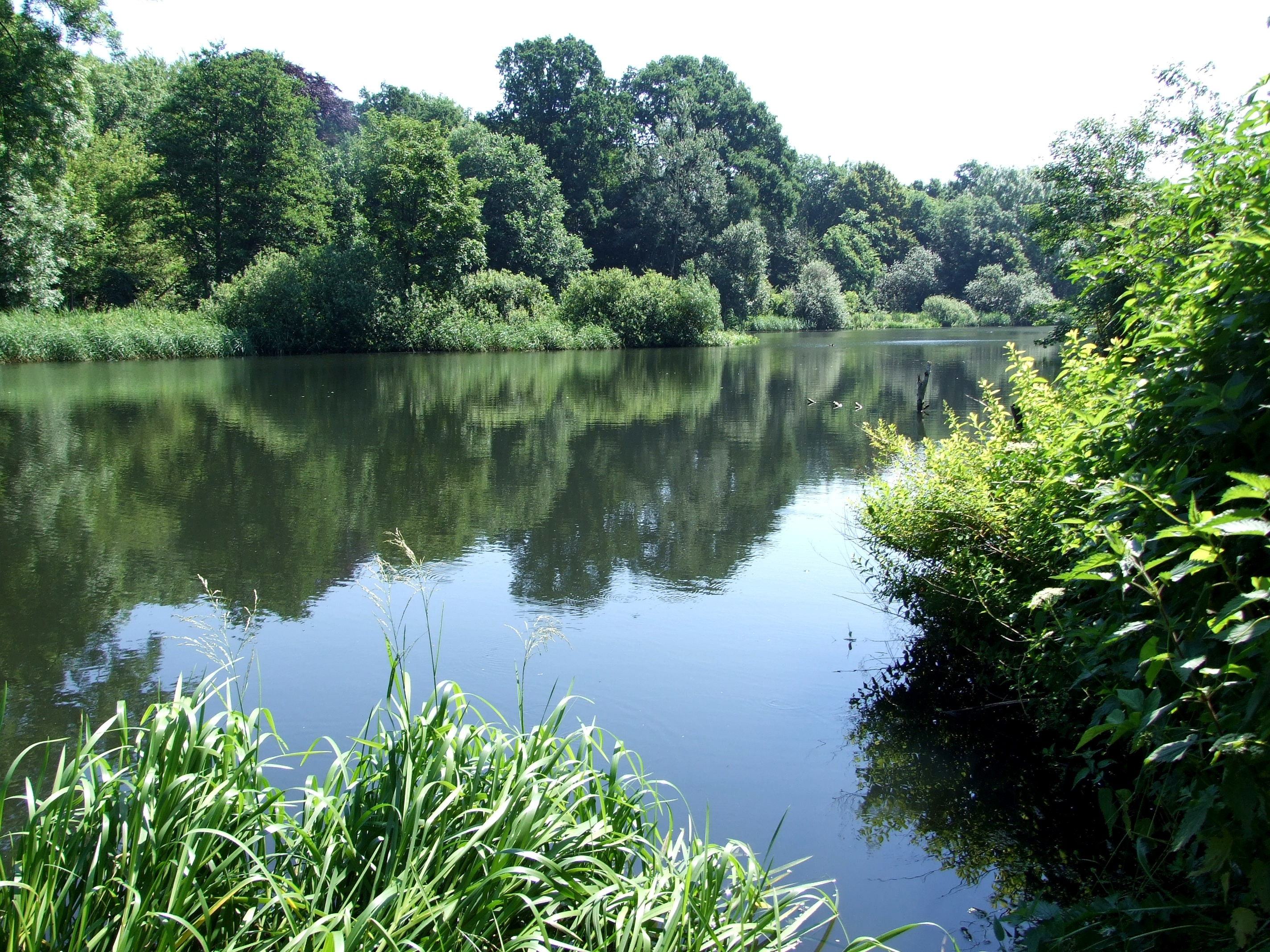 Syrenie Stawy, Szczecin, Polska